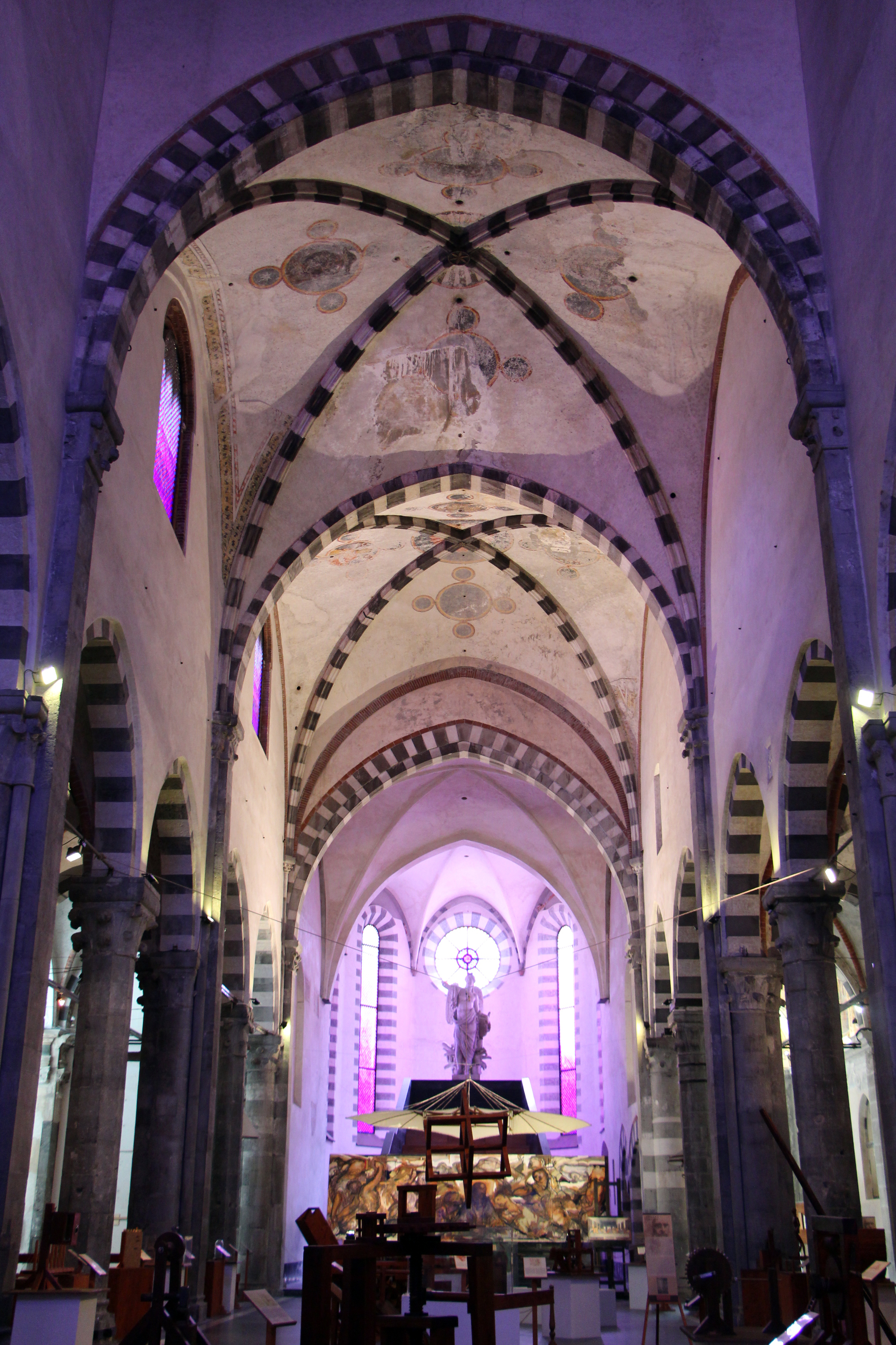 Chiostri e museo di Sant'Agostino The making of this document was supported by Wikimedia CH. (Submit your project!) For all the files concerned, please see the category Supported by Wikimedia CH. This is a photo of a monument which is part of cultural heritage of Italy.